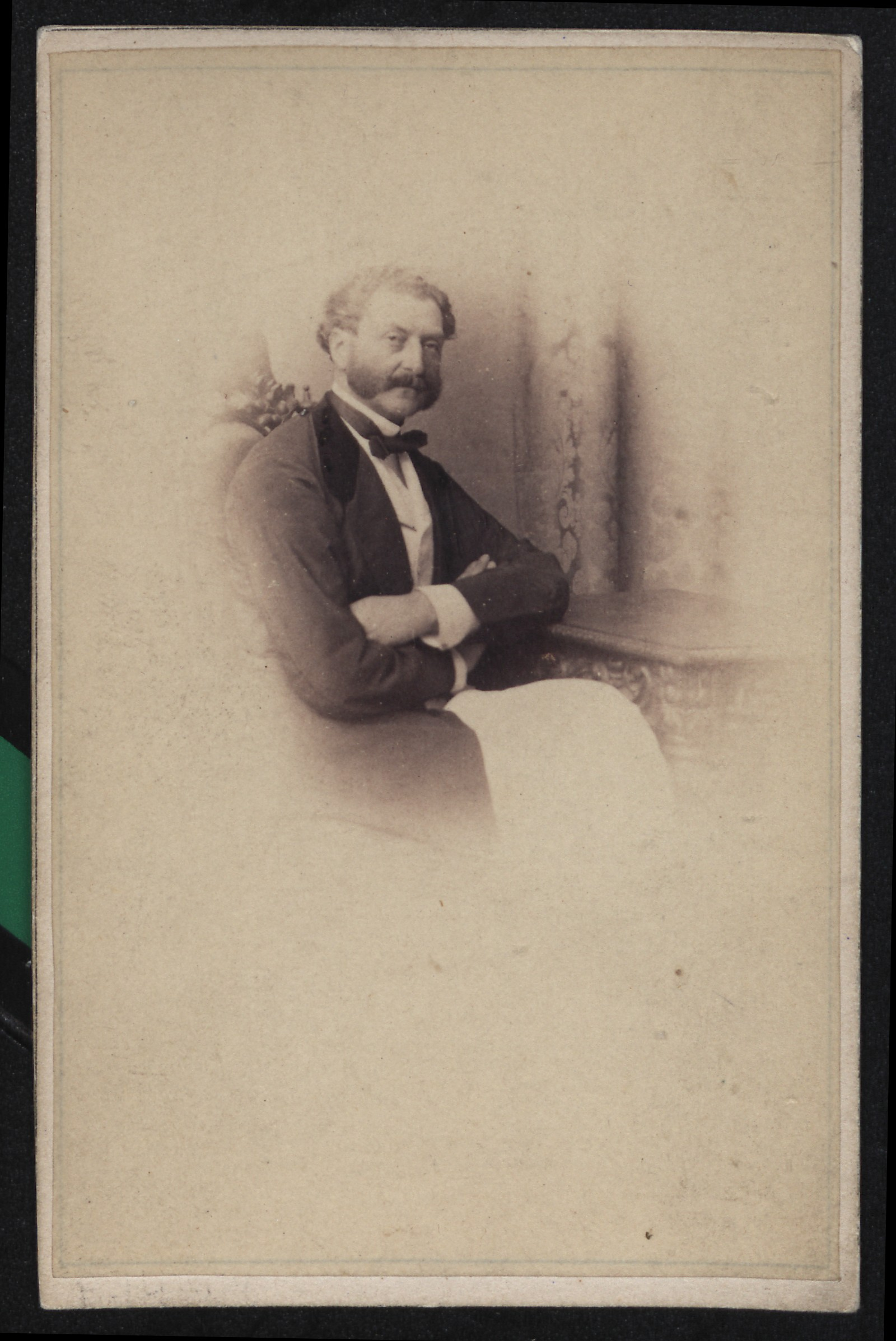 Stanisław Aleksandrowicz, [ante 1862]